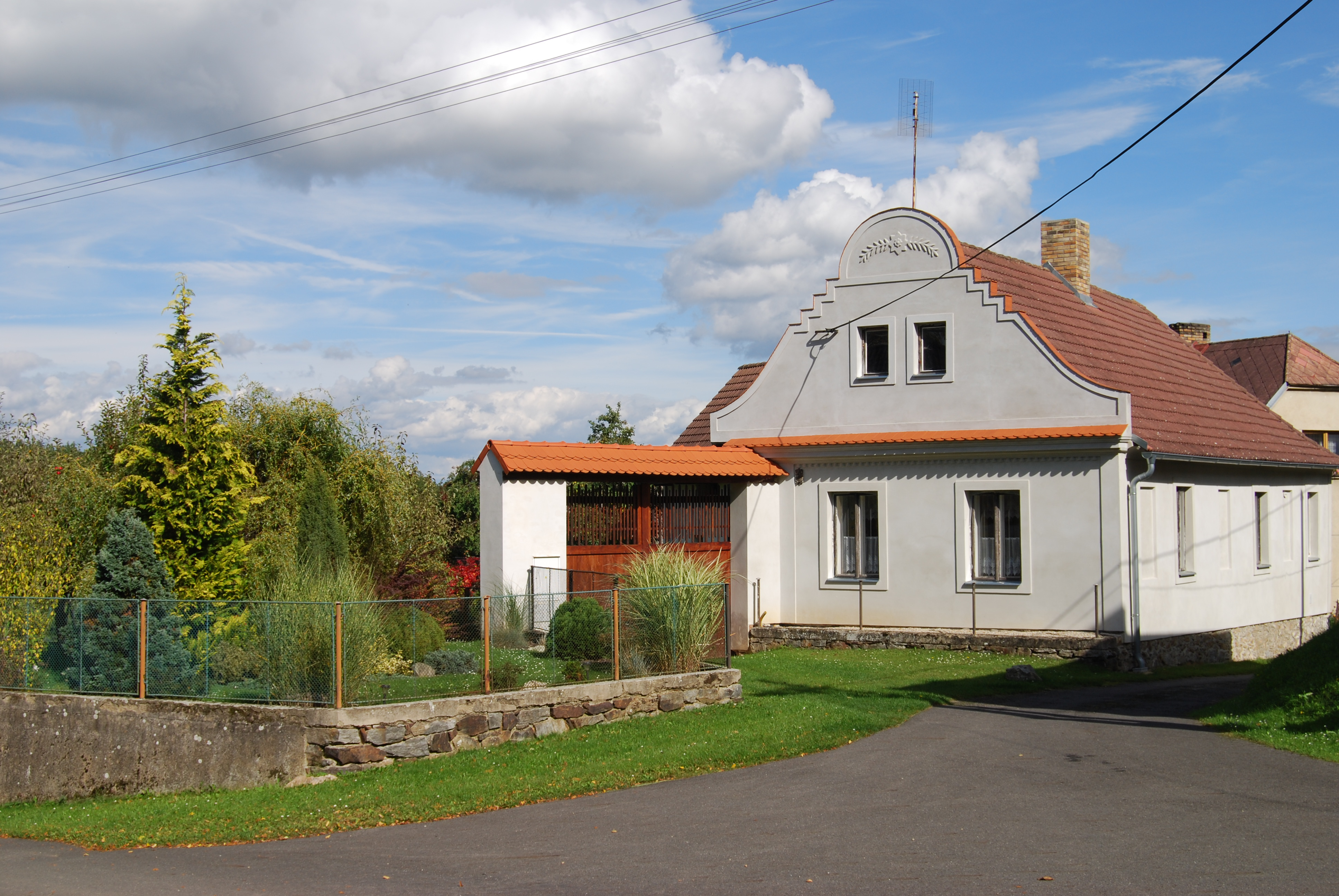 Usedlost v obci. Zběšice je část obce Bernartice v okrese Písek. Česká republika.